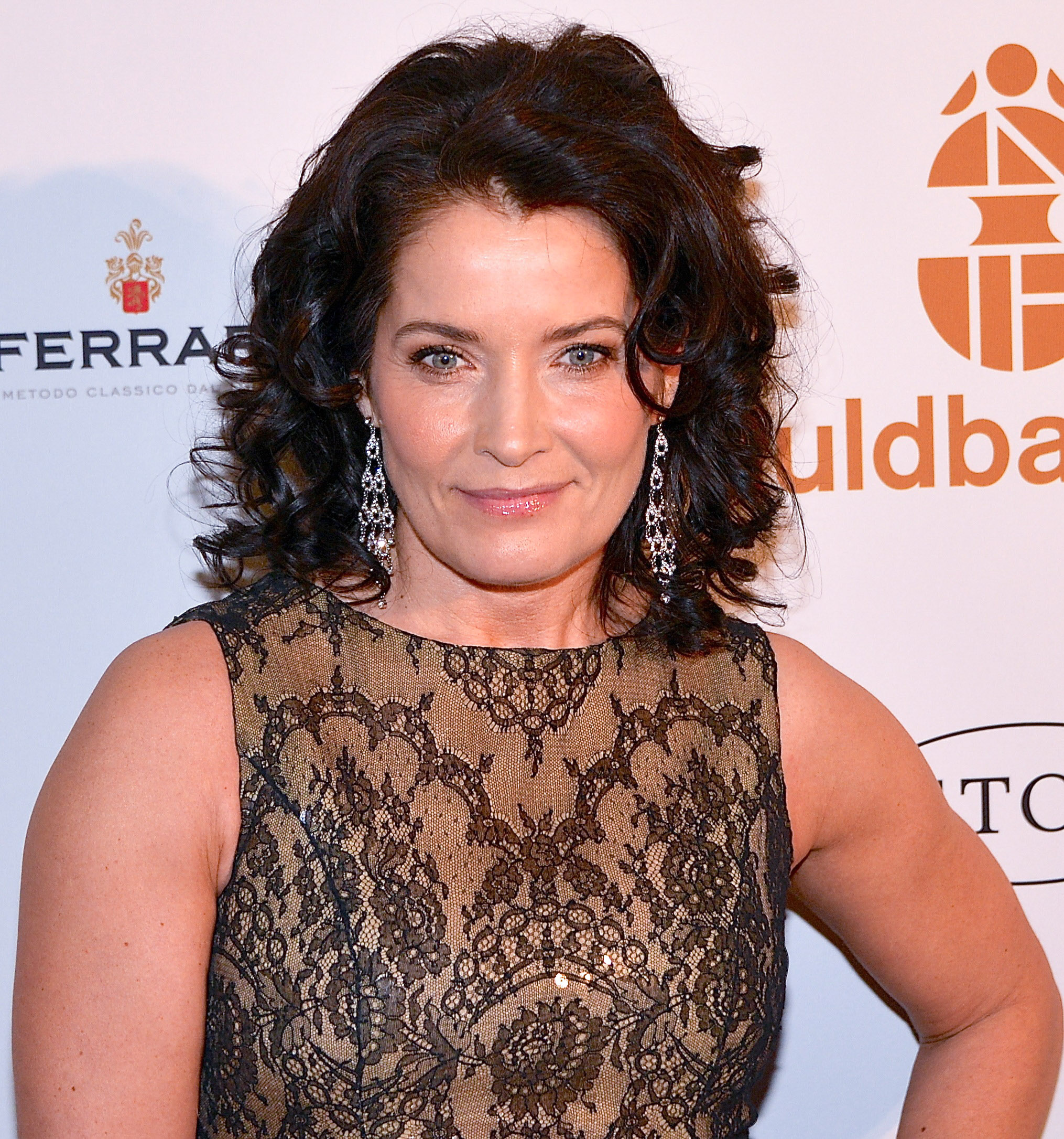 Agneta Sjödin på Guldbaggegalan den 21 januari 2013.